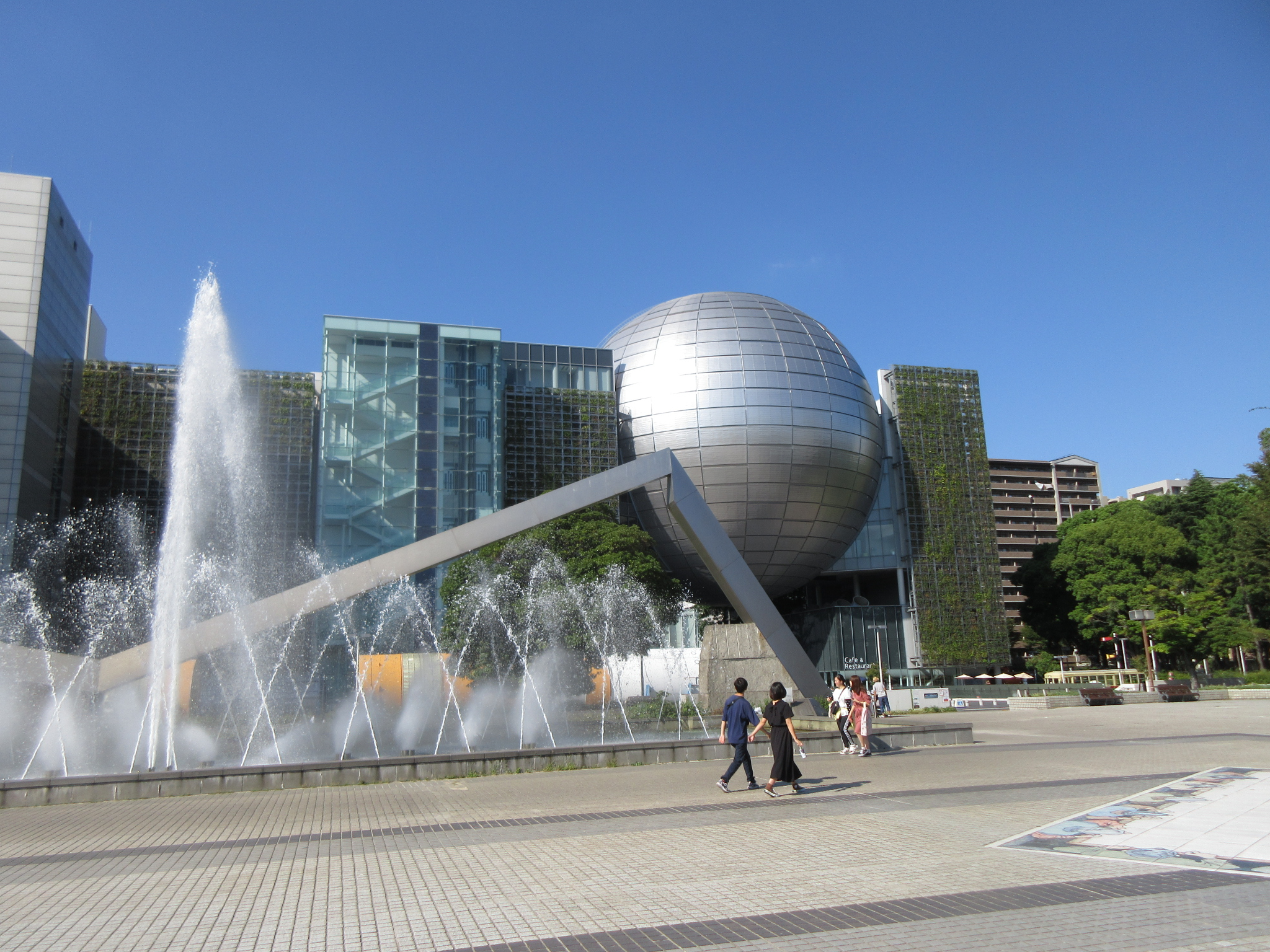 名古屋市科学館（名古屋市中区栄）